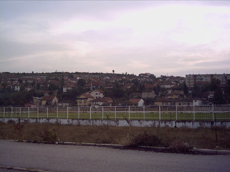 Kumanovo, Macedonia